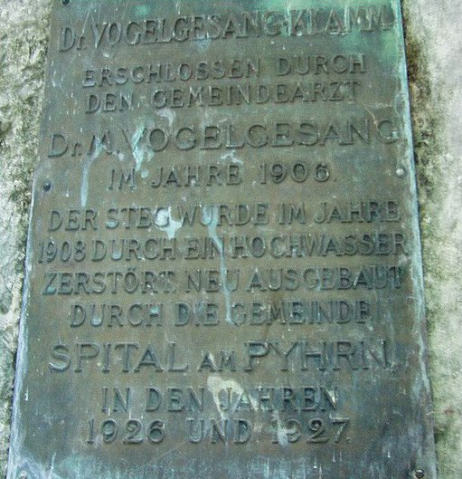 Dr.-Vogelgesang-Klamm – Informationstafel